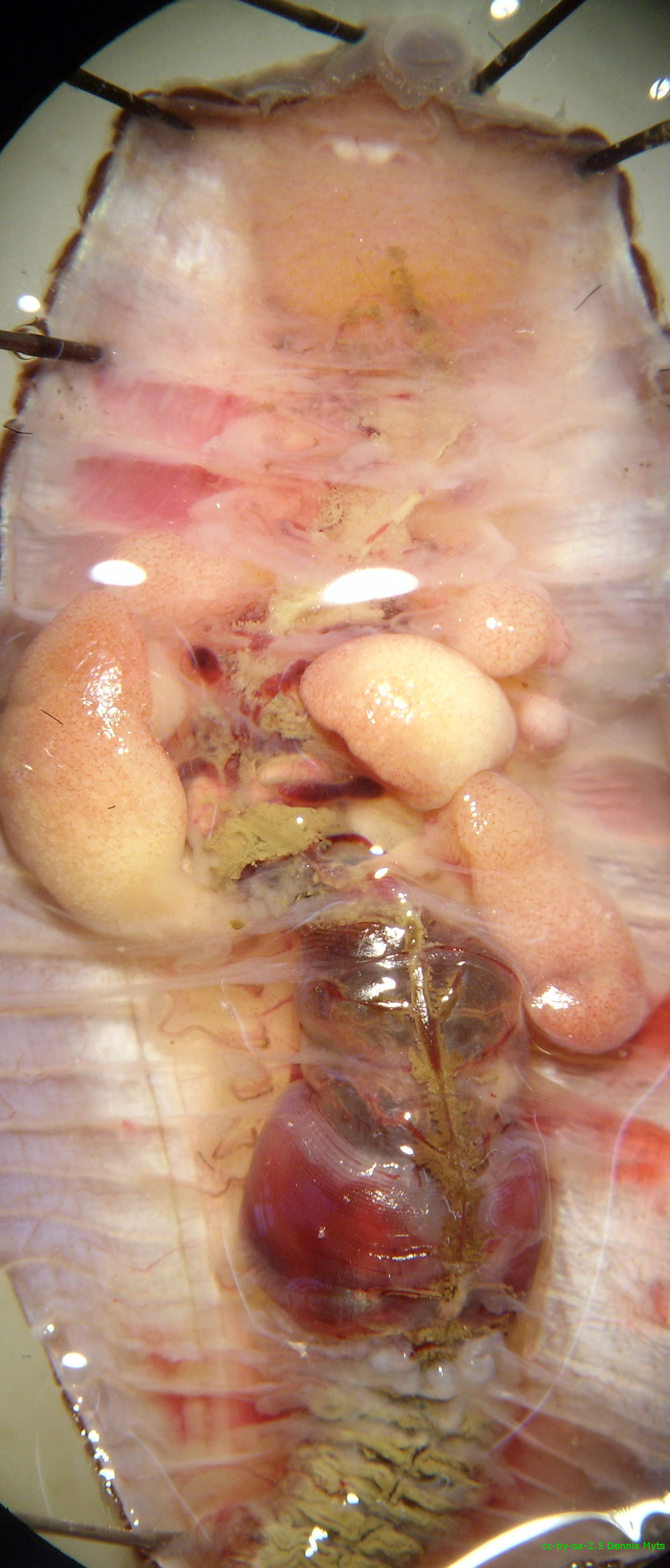 Препарат дождевого червя.